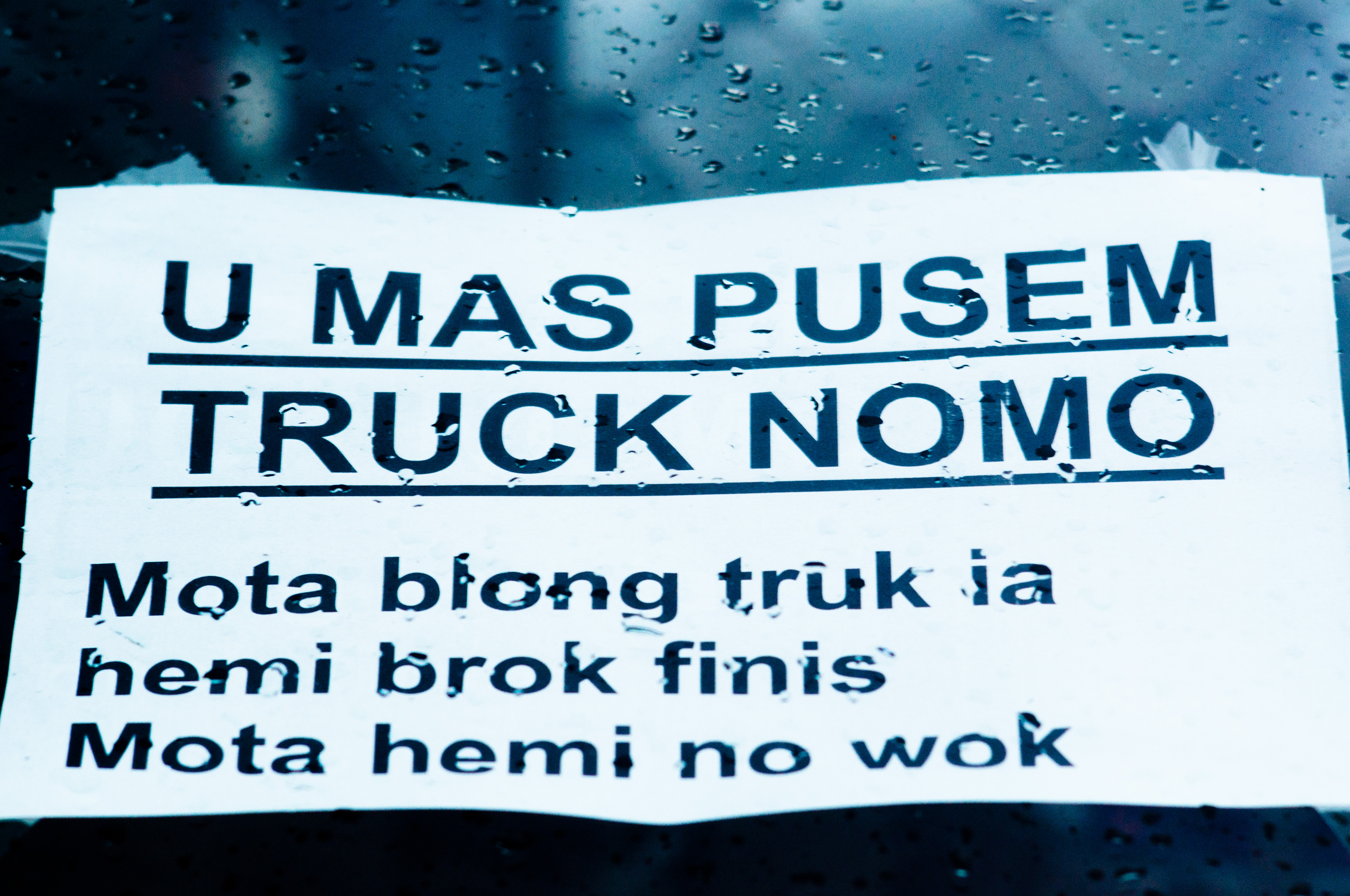 Pusem Trak Nomo